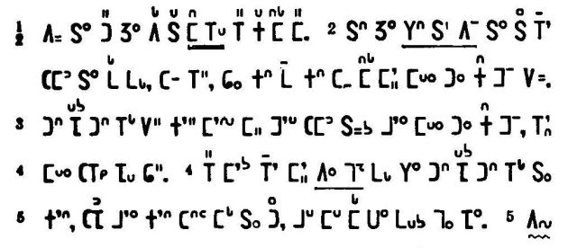 Текст на языке и, записанный письмом Полларда (фрагмент из Библии)